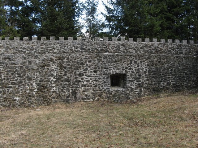 Lanišče, ostanek Rimskih utrdb